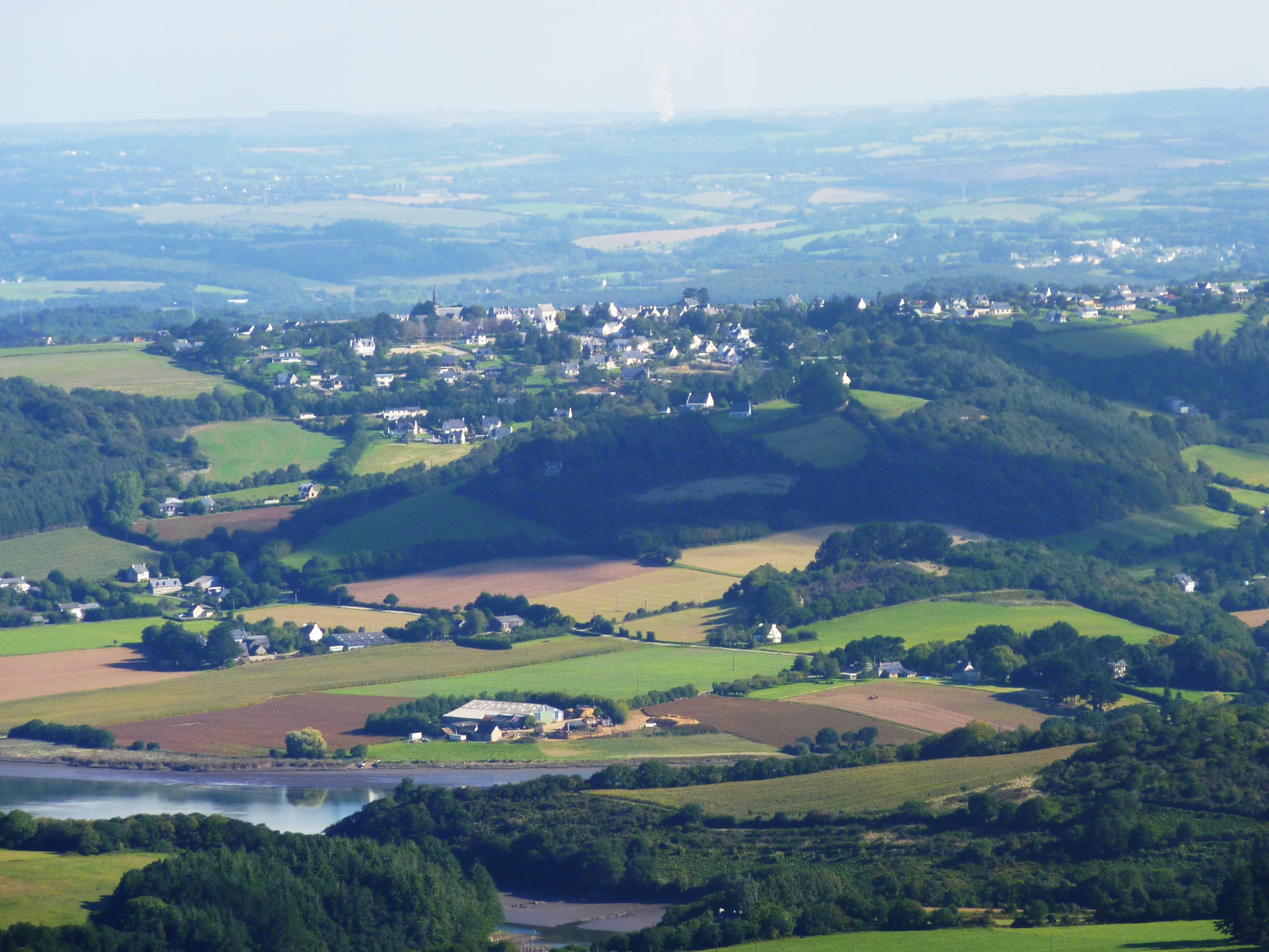 Rosnoën vu du sommet du Menez-Hom